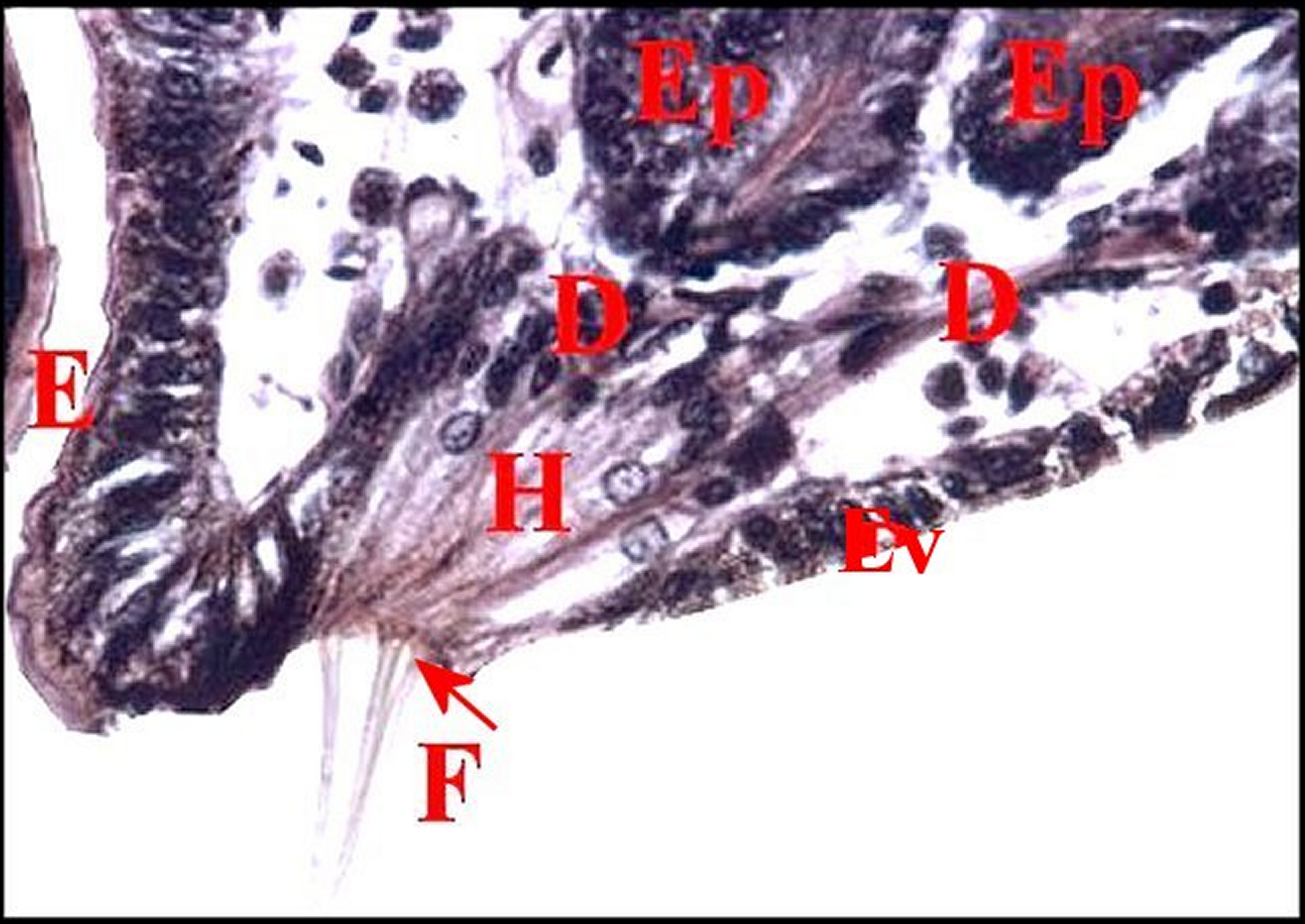 Argiope, glandes épigastriques prégonoporales et leur terminaison, avec les canaux excréteurs, leurs fusules et l'épithélium du "puits" modifié.. Coupe histologique.